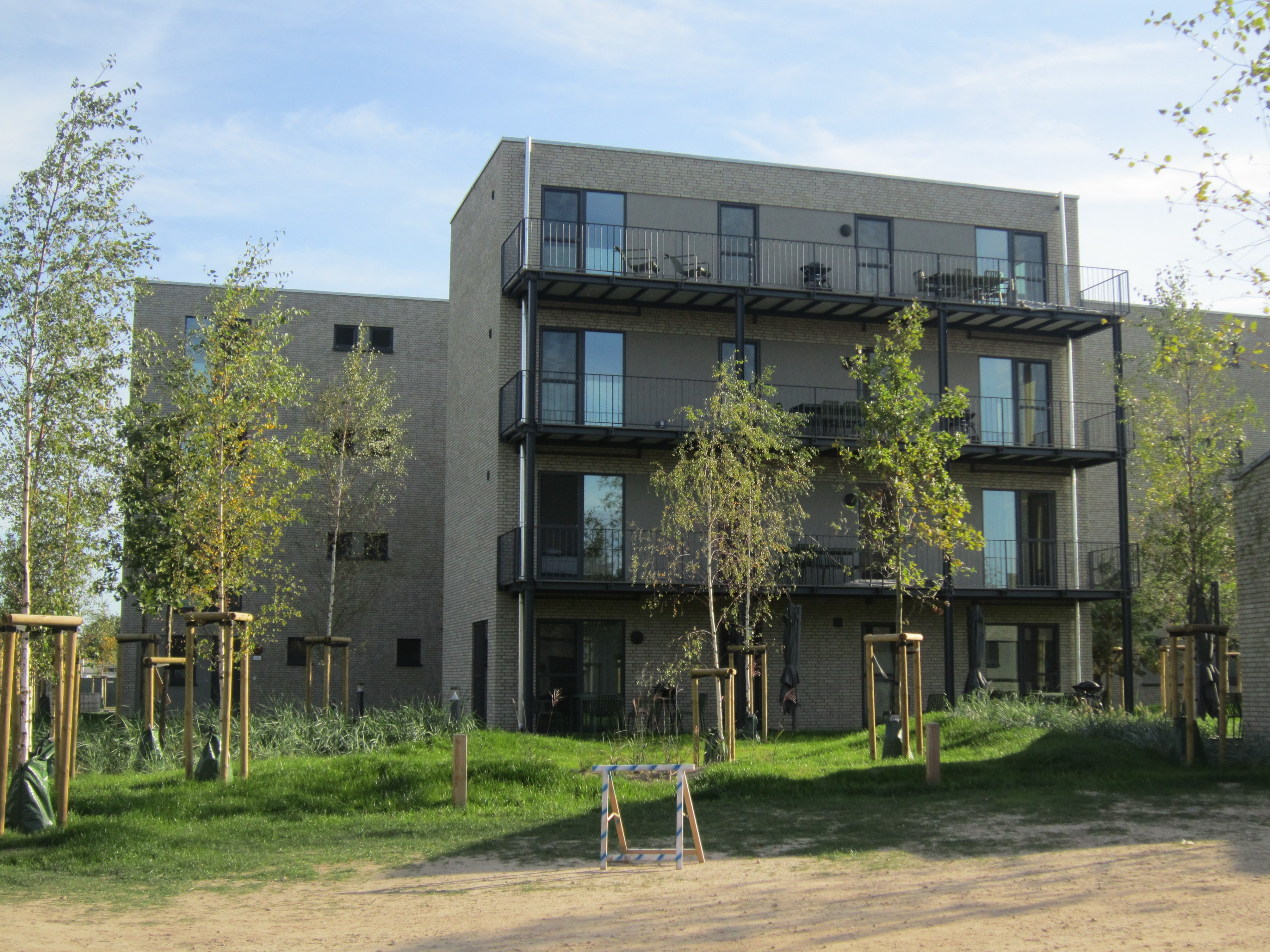 Die ersten fertiggestellten Wohnungen im Marissa-Park bei Lembruch am Ostufer des Dümmers Ende September 2019